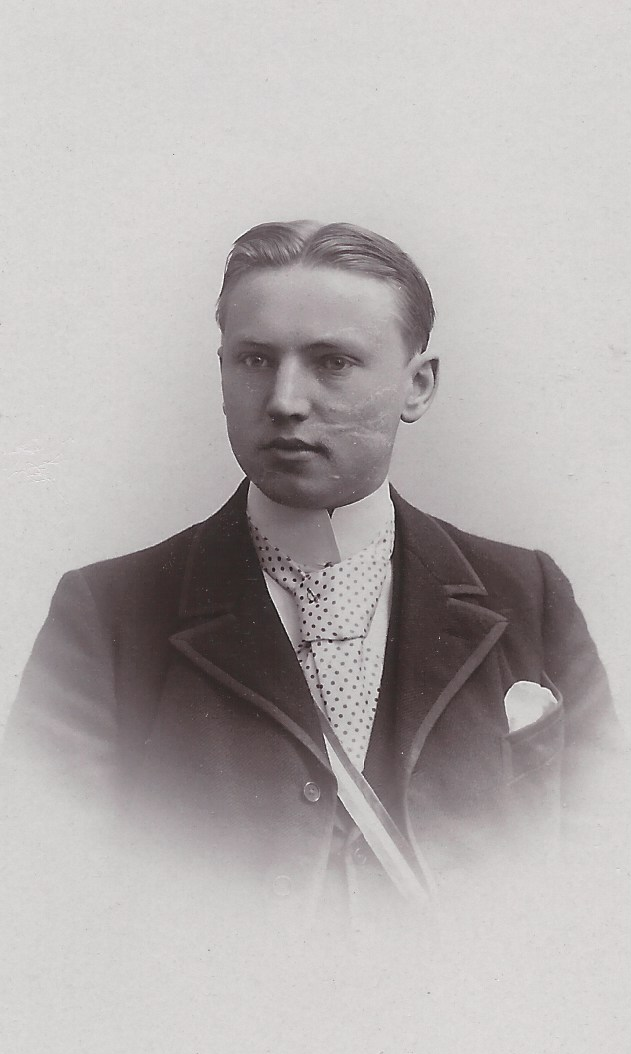 Karl Rembert als Mitglied des Corps Teutonia Halle